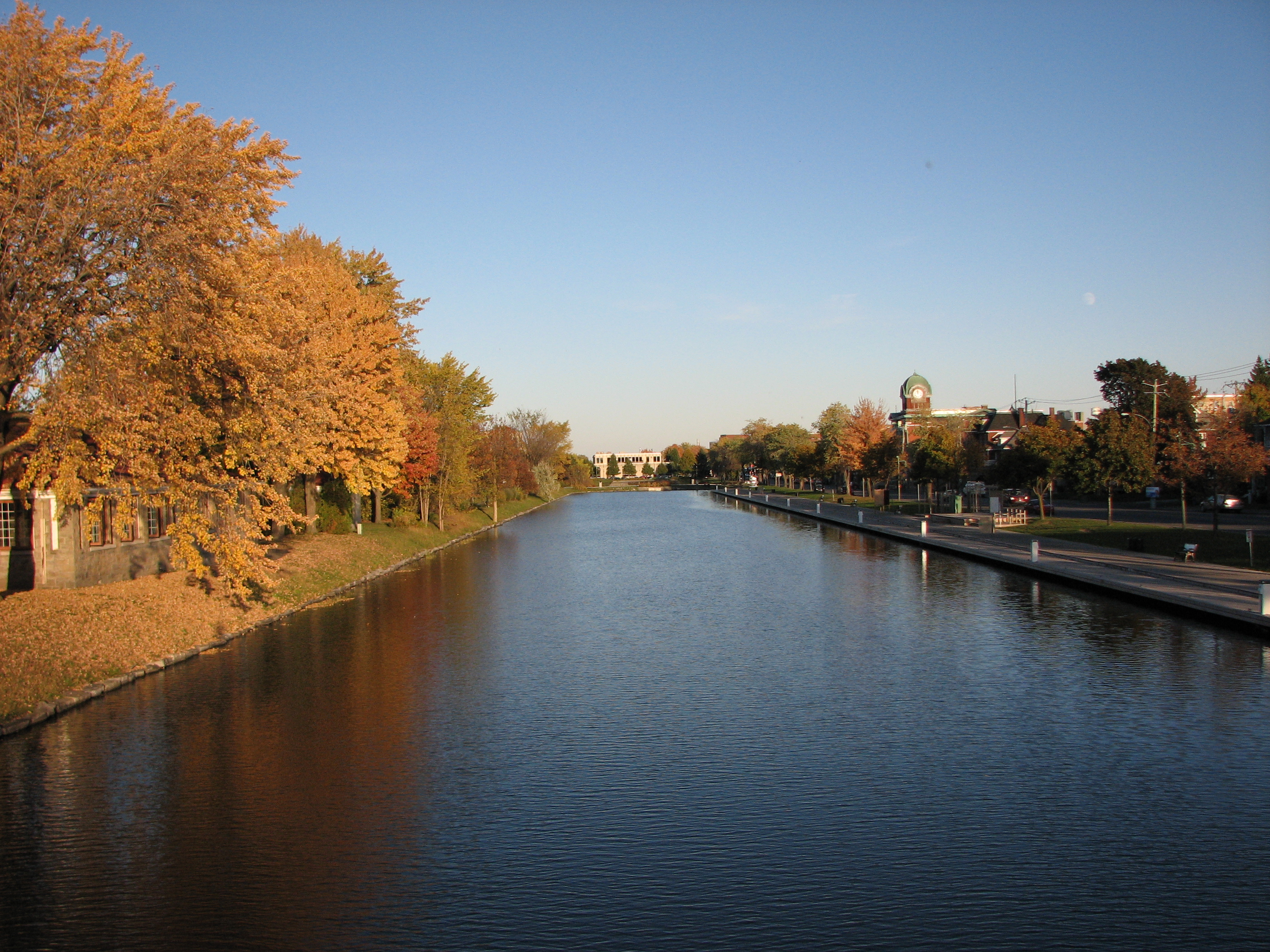 Cliché du vieux canal de Salaberry-de-Valleyfield au Québec